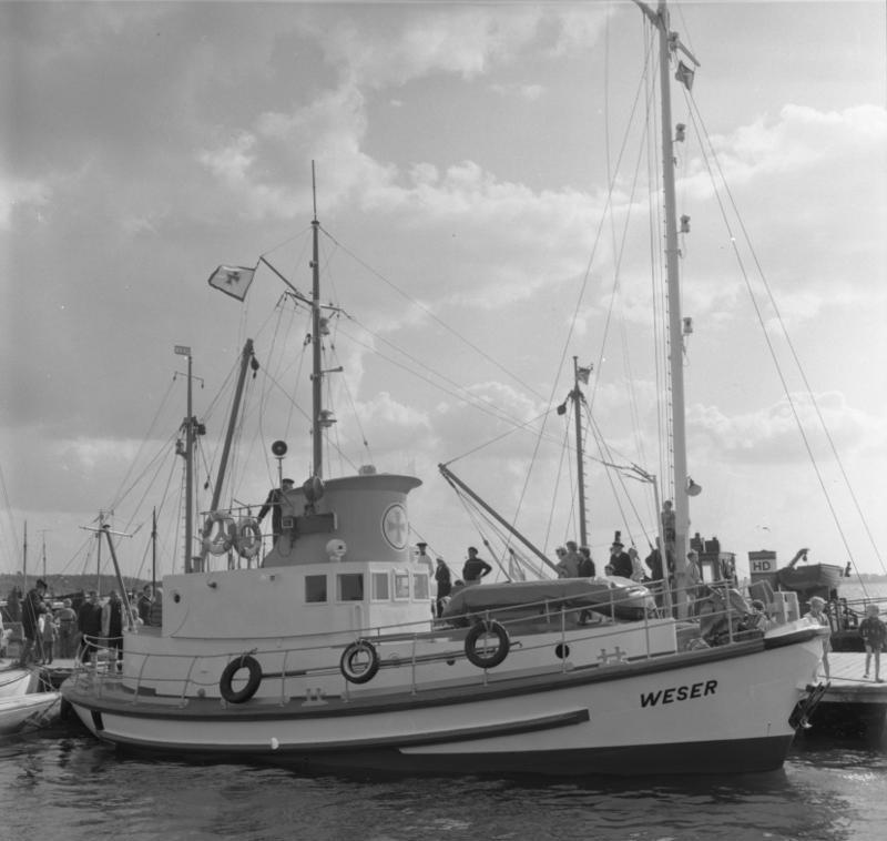 Kieler Woche (Dänische Volksboote in Möltenort)